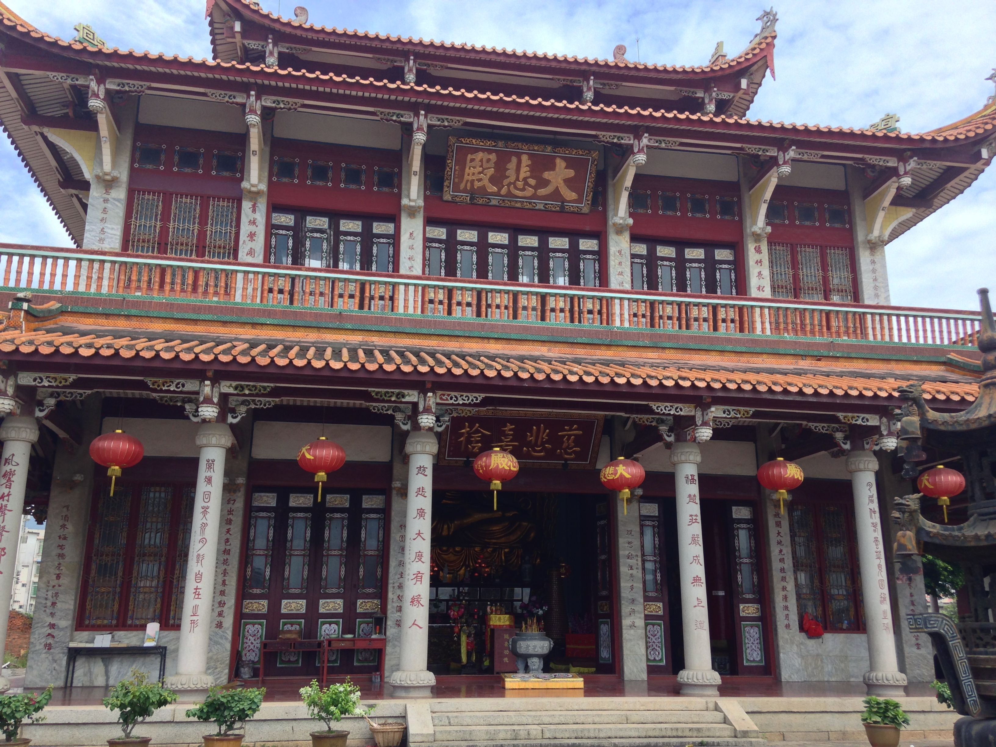 莆田梅峰光孝寺大悲殿